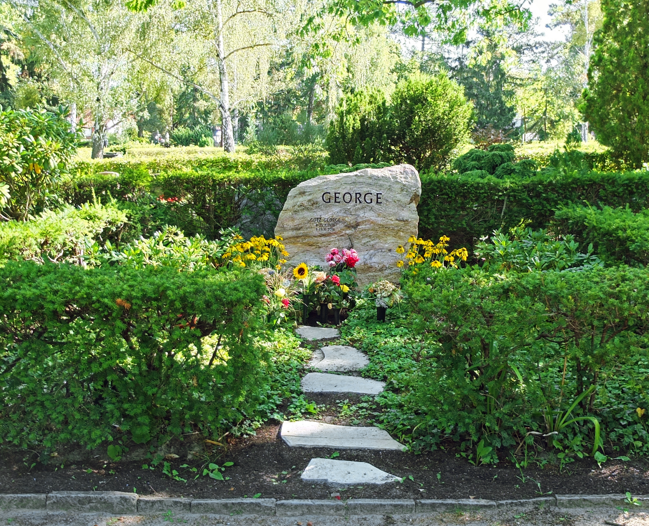 Grab von Götz George auf dem Friedhof Zehlendorf in Berlin